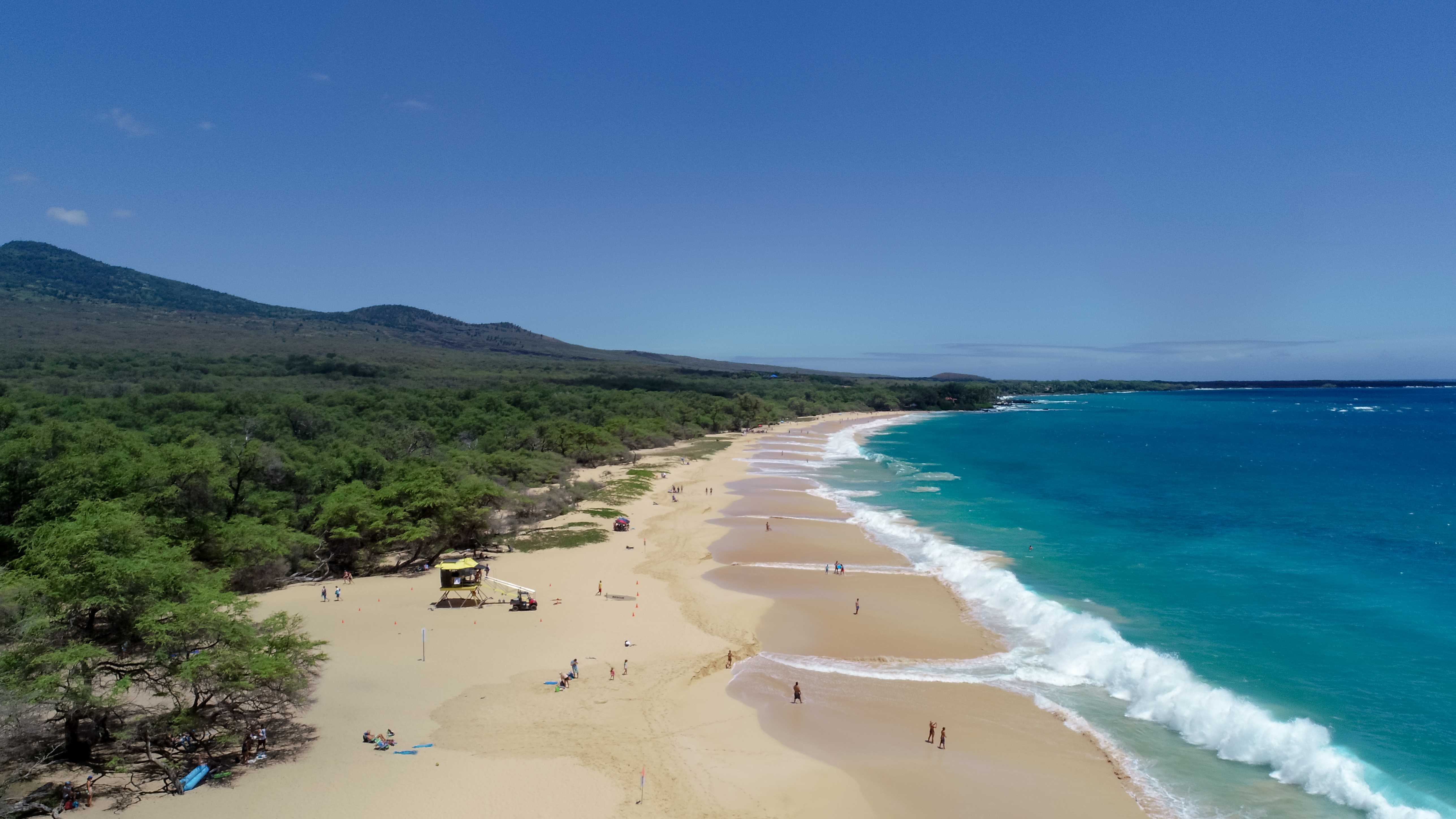 Luftbildaufnahme Makena Big Beach, Maui Hawaii